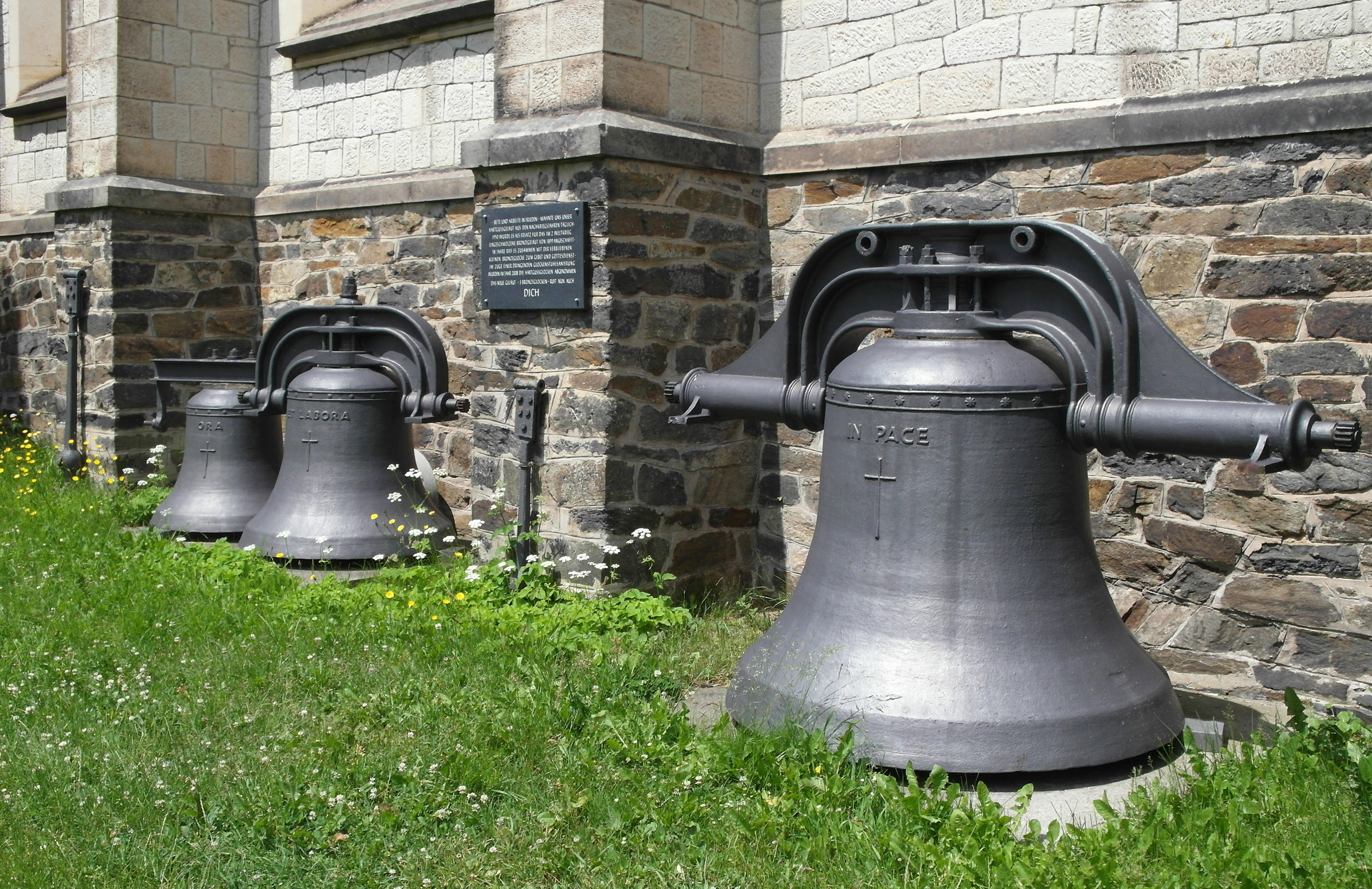 17.06.2017 09623 Rechenberg (Rechenberg-Bienenmühle): Neogotische Kirche Rechenberg. An der Schanze 4 (GMP: 50.737365,13.555675). Die alten Stahlglocken. Hartgußgeläut aus den Nachkriegsjahren. 1950 als Ersatz für das im 2. Weltkrieg eingeschmolzene Bronzegeläut von 1899 angeschafft. Im Zuge einer Glockenstuhlsanierung wurden im Jahr 2008 die Hartgußglocken abgenommen und durch 3 neue Bronzeglocken ersetzt. [SAM0441.JPG]20170617260DR.JPG(c)Blobelt